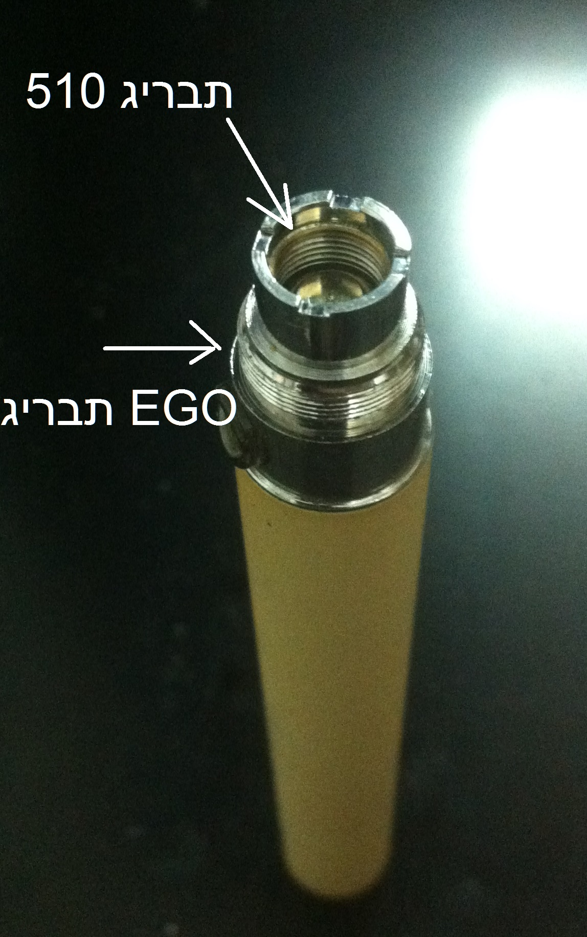 הסיגריה האלקטרונית שאתה הפסקתי לעשן Joyetech EGO C TWIST